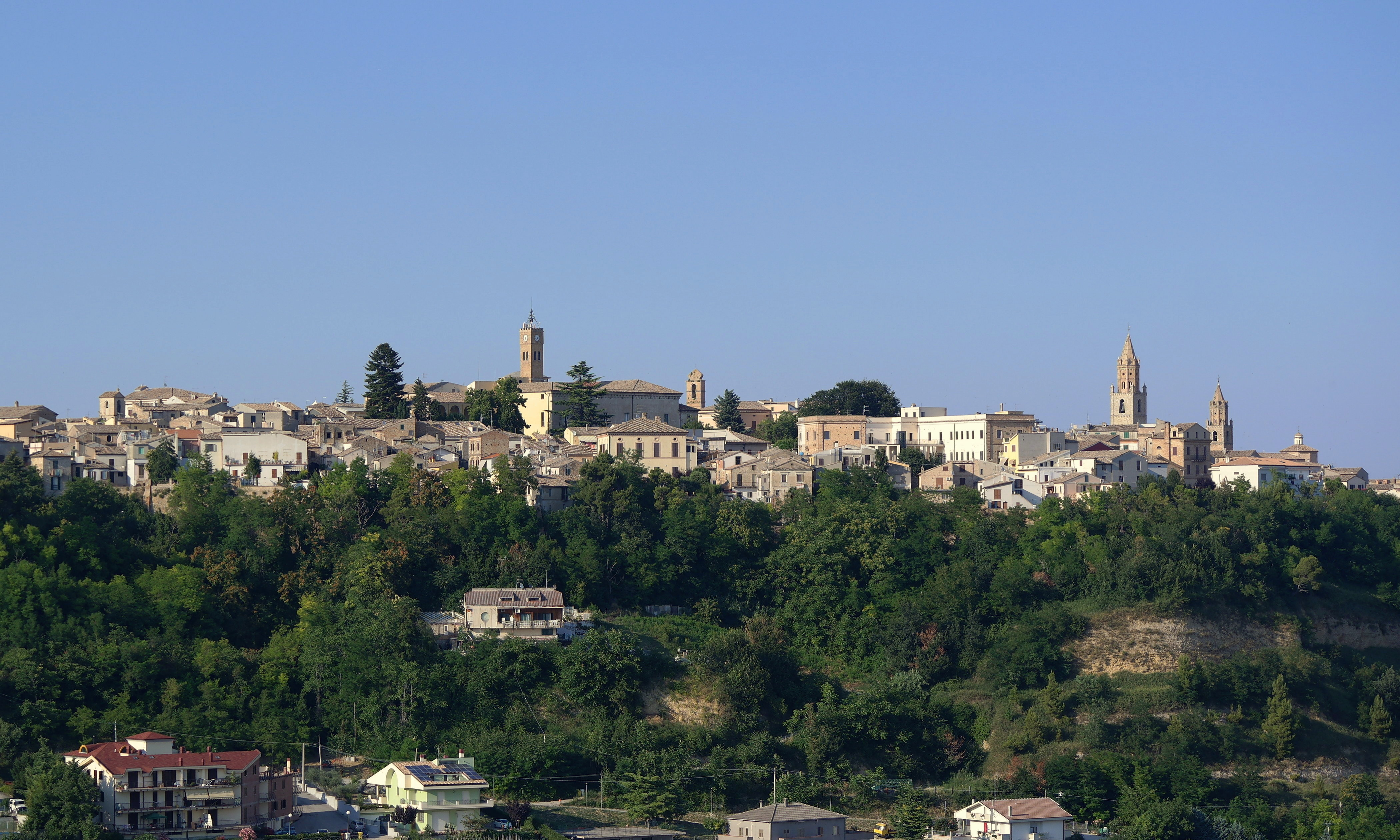 Panorama di Atri dal colle di giustizia